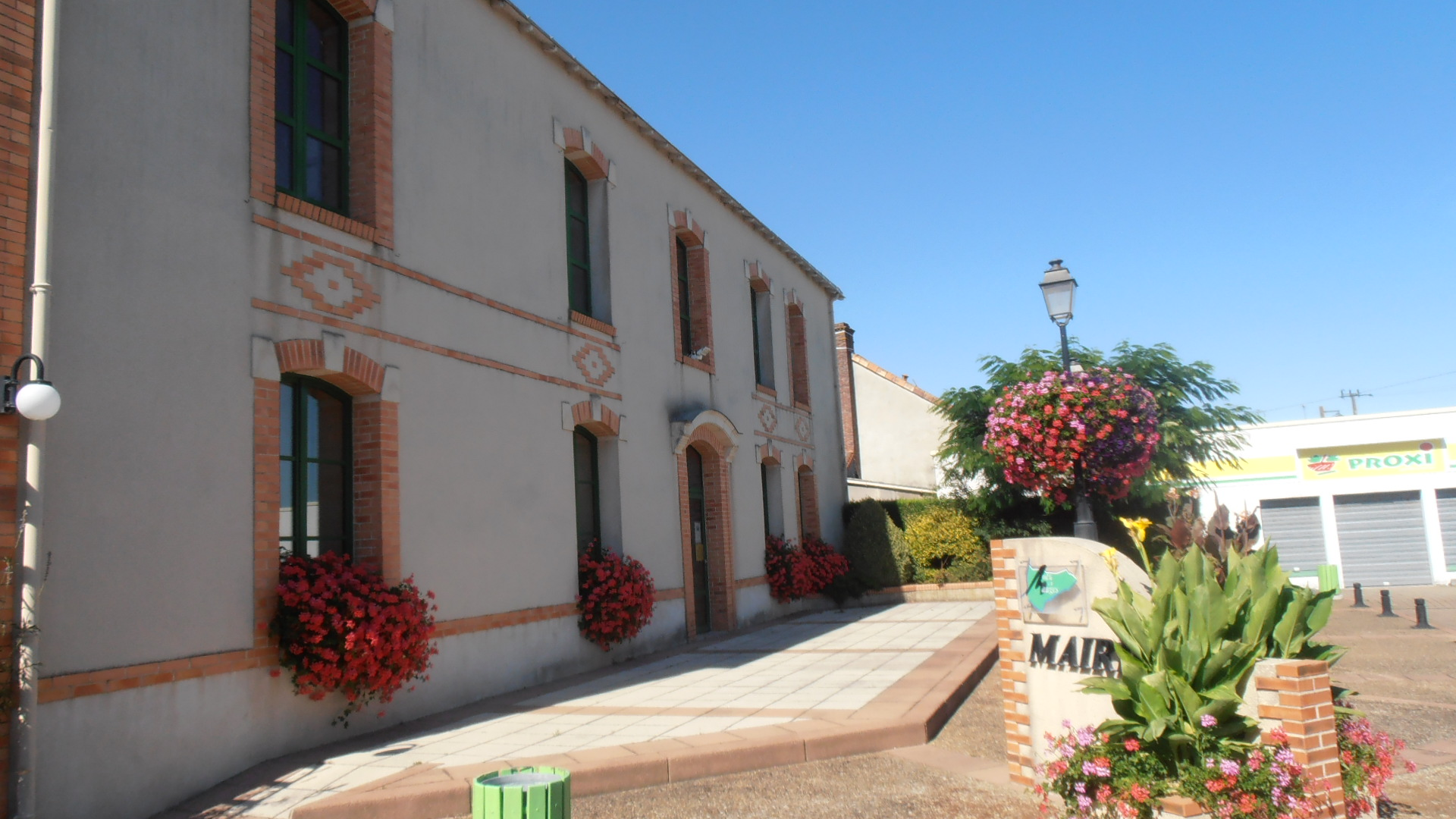 La mairie de Botz-en-Mauges (Maine-et-Loire, France).